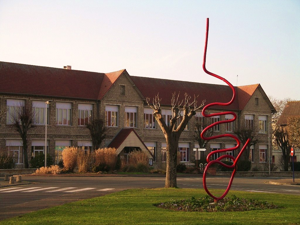 Monument de la dernière coulée de la Société Métallurgique de Normandie provenant des laminoirs après la dernière coulée du 5 novembre 1993 place des tilleuls à Colombelles, Calvados (France)